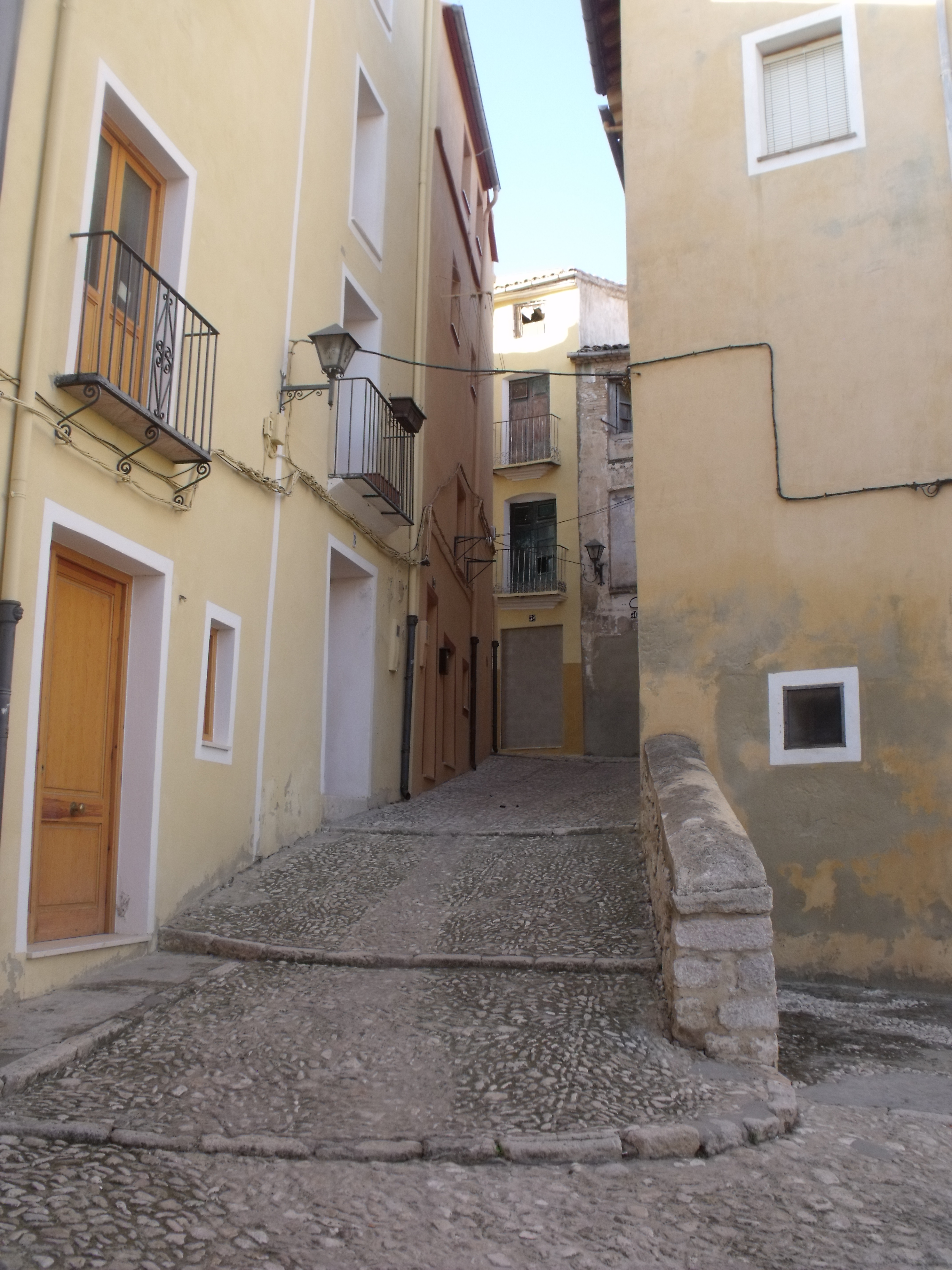 Diversos edificios y calles de la Vila de Onteniente